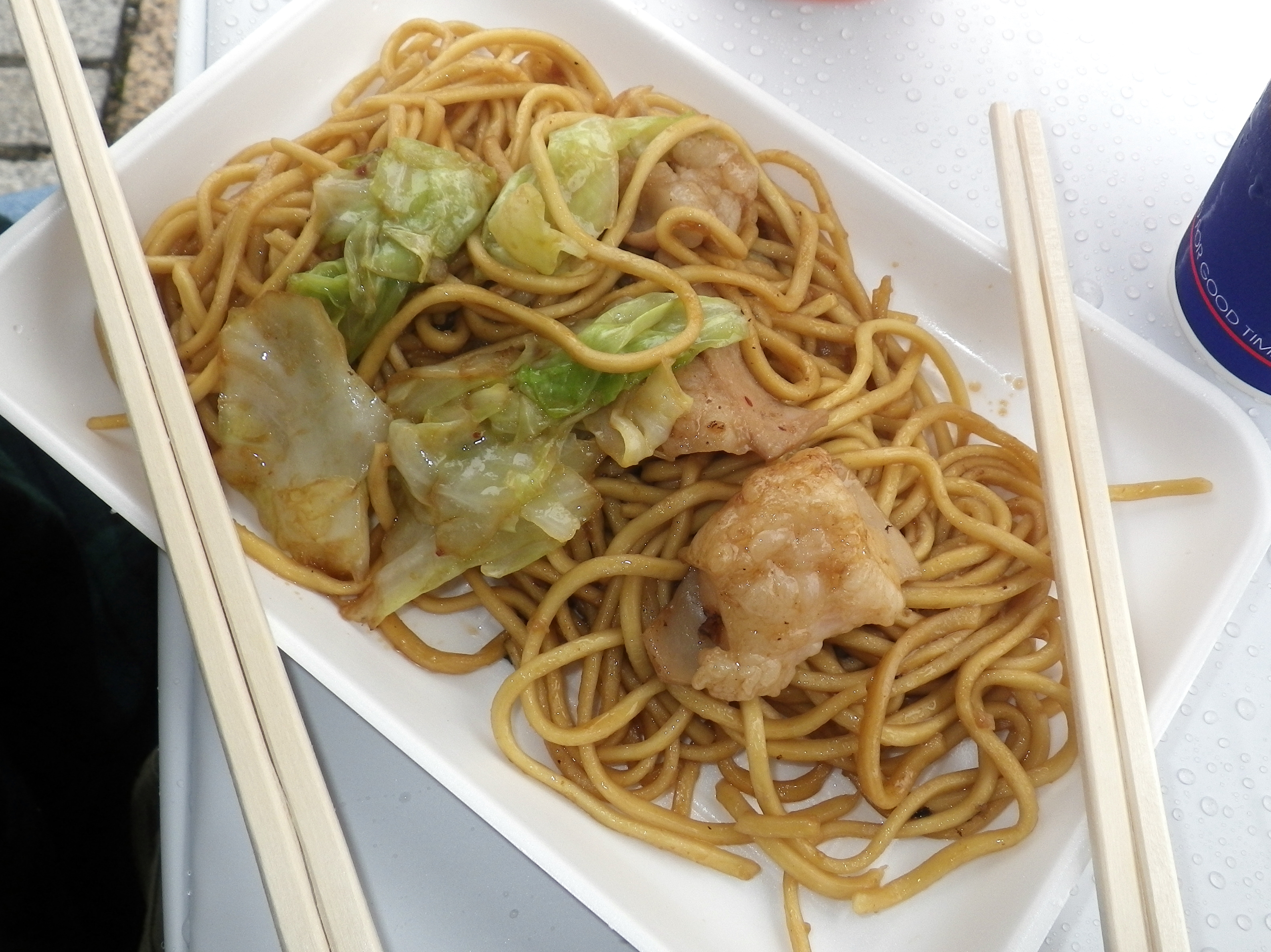 ホルモンづいてしまってついつい(笑)